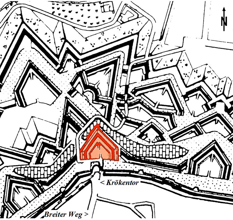 grafische Darstellung der Bastion Hessen in Magdeburg